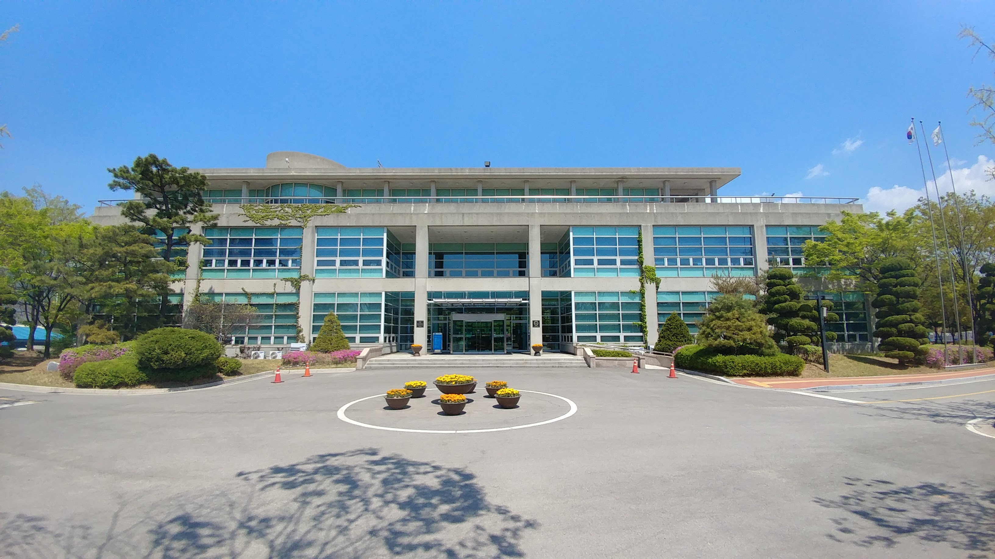 경기과학기술대학교 대학본부